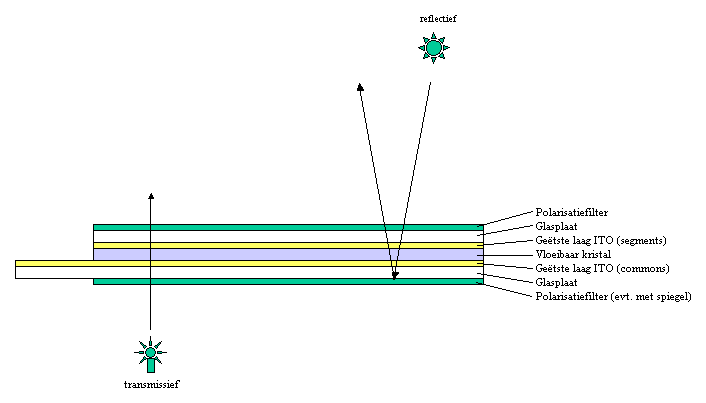 eigen creatie